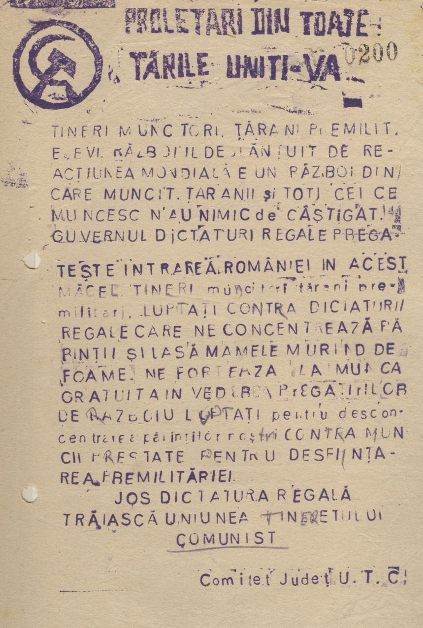 Manifest comunist împotriva concentrărilor și a dictaturii regale, Basarabia